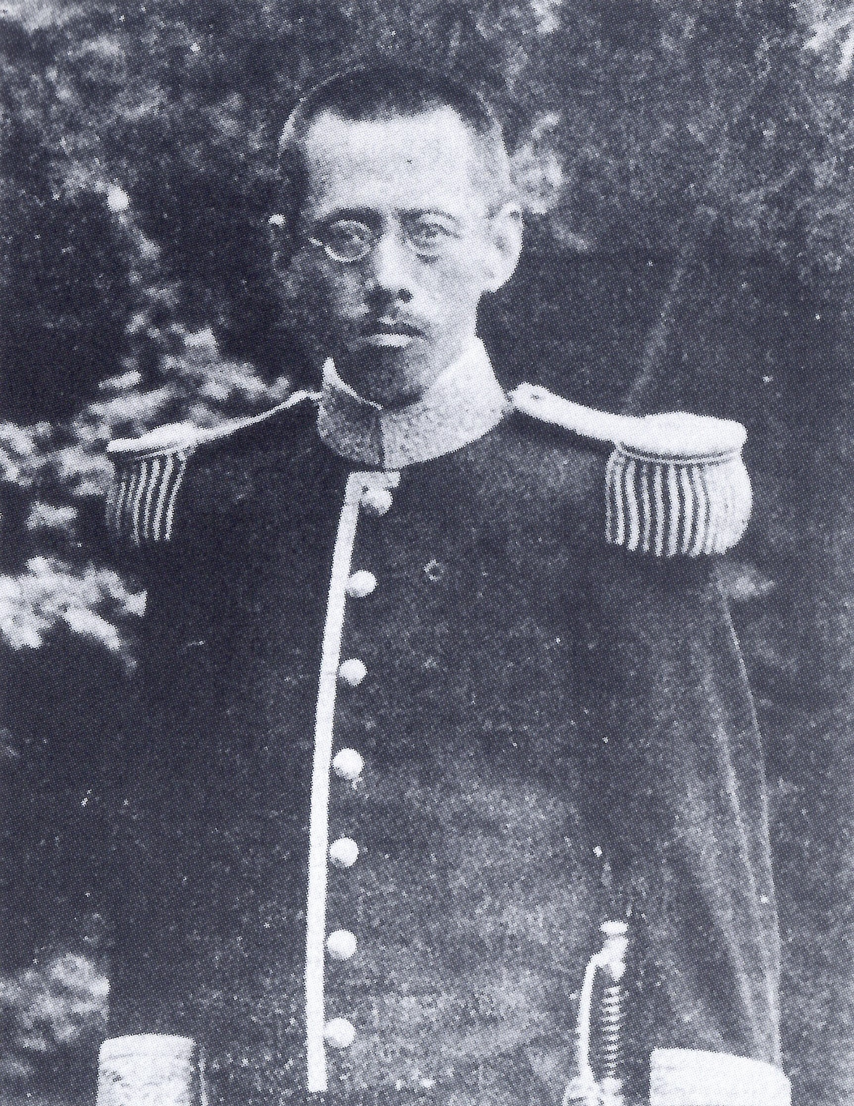 加藤泰令の肖像写真。